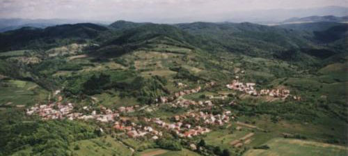 Podhorie